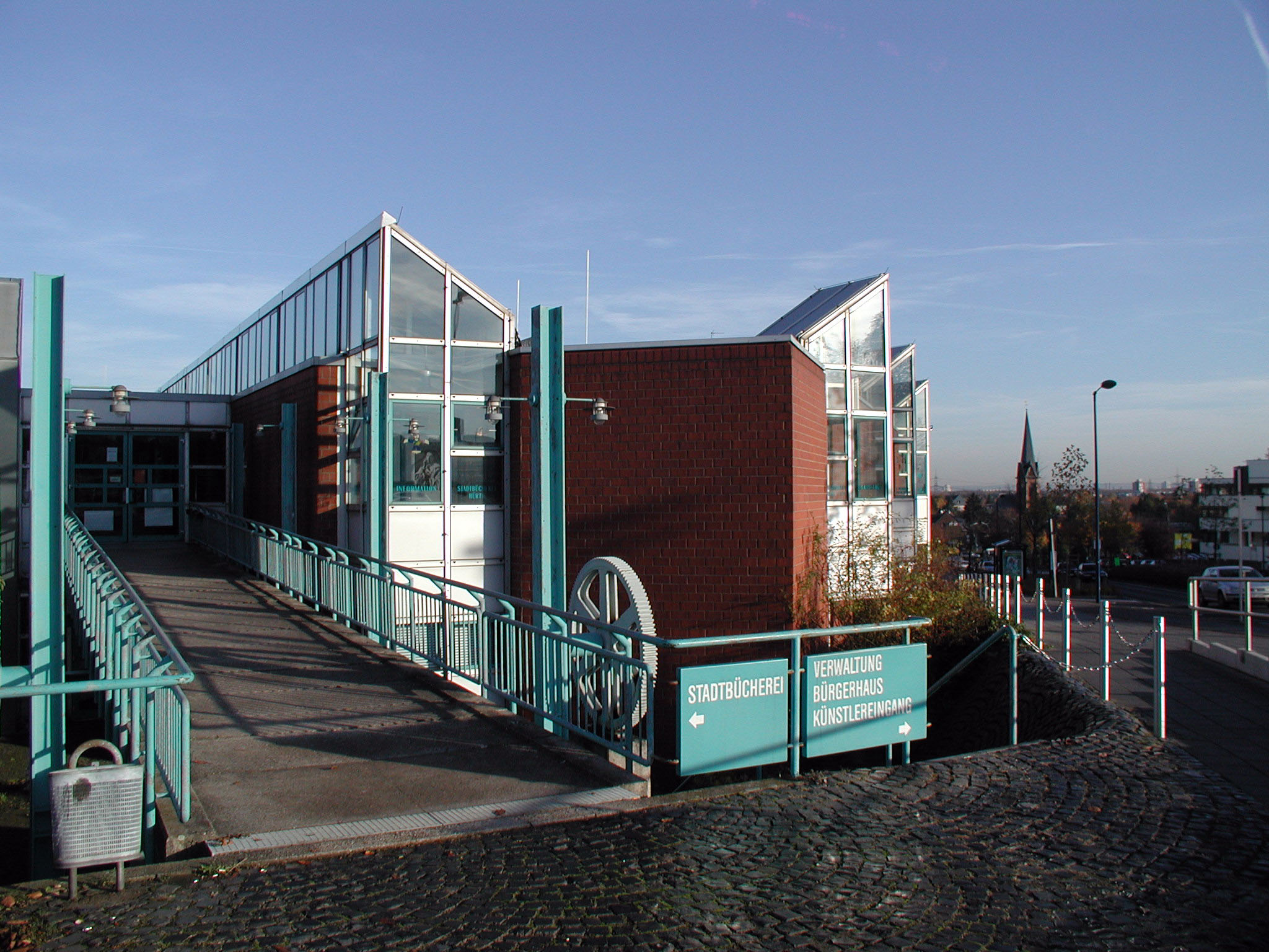 Hürth-Zentrum, Stadtbibliothek